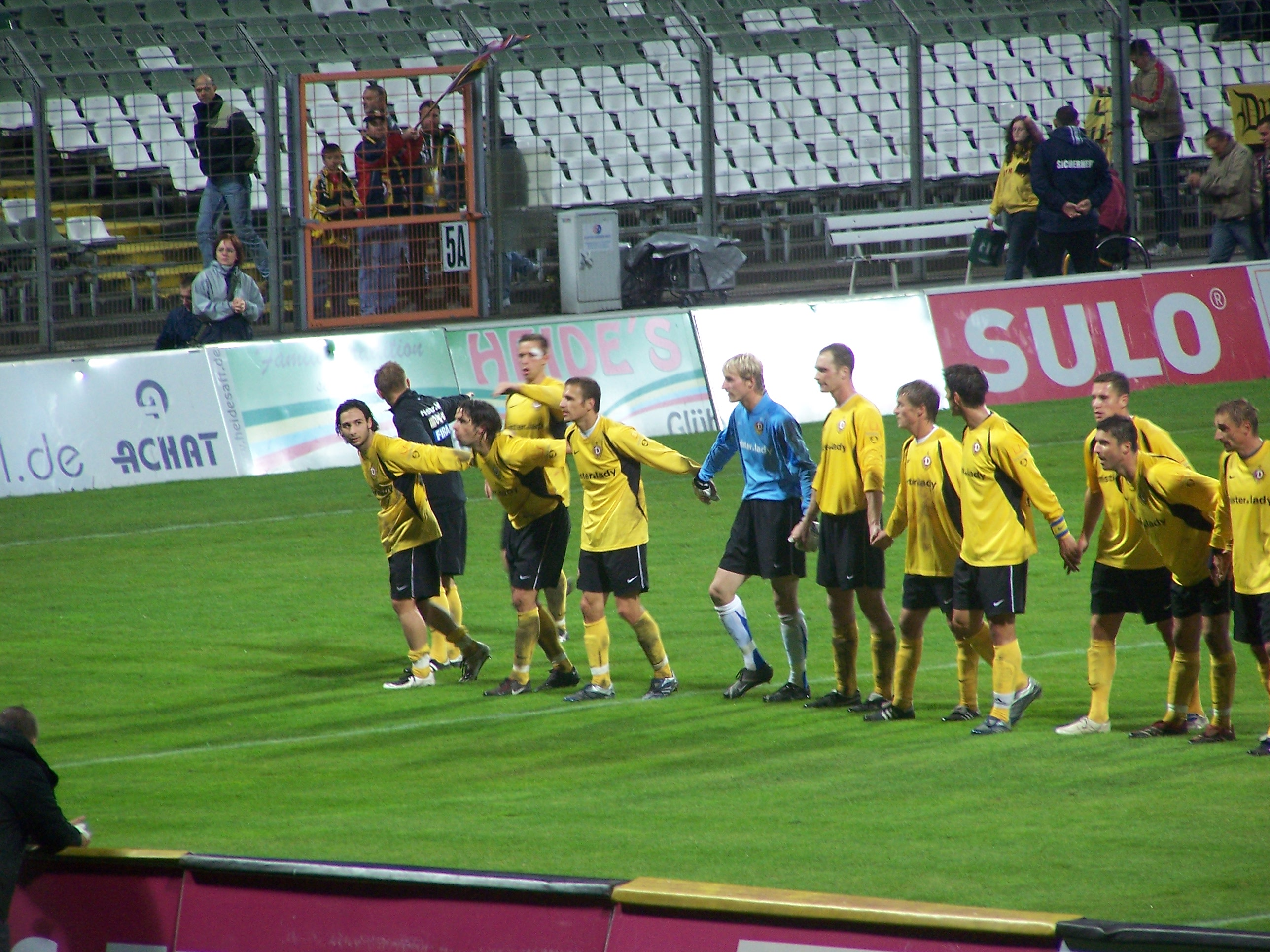 Flutlichtspiel gegen die Wolfsburg-Amateure der SG Dynamo Dresden